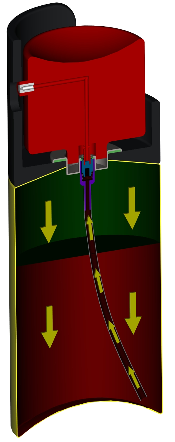 Funktionsweise und schematischer Aufbau eines Reizstoffsprühgerätes. Das Treibmittel (grün) steht unter Druck und drückt den Wirkstoff (rot) durch das Steigrohr nach oben gegen das Ventil. Wenn das Ventil (Ventilgehäuse lila, Ventilsitz cyan) geöffnet wird, kann der Wirkstoff entweichen.